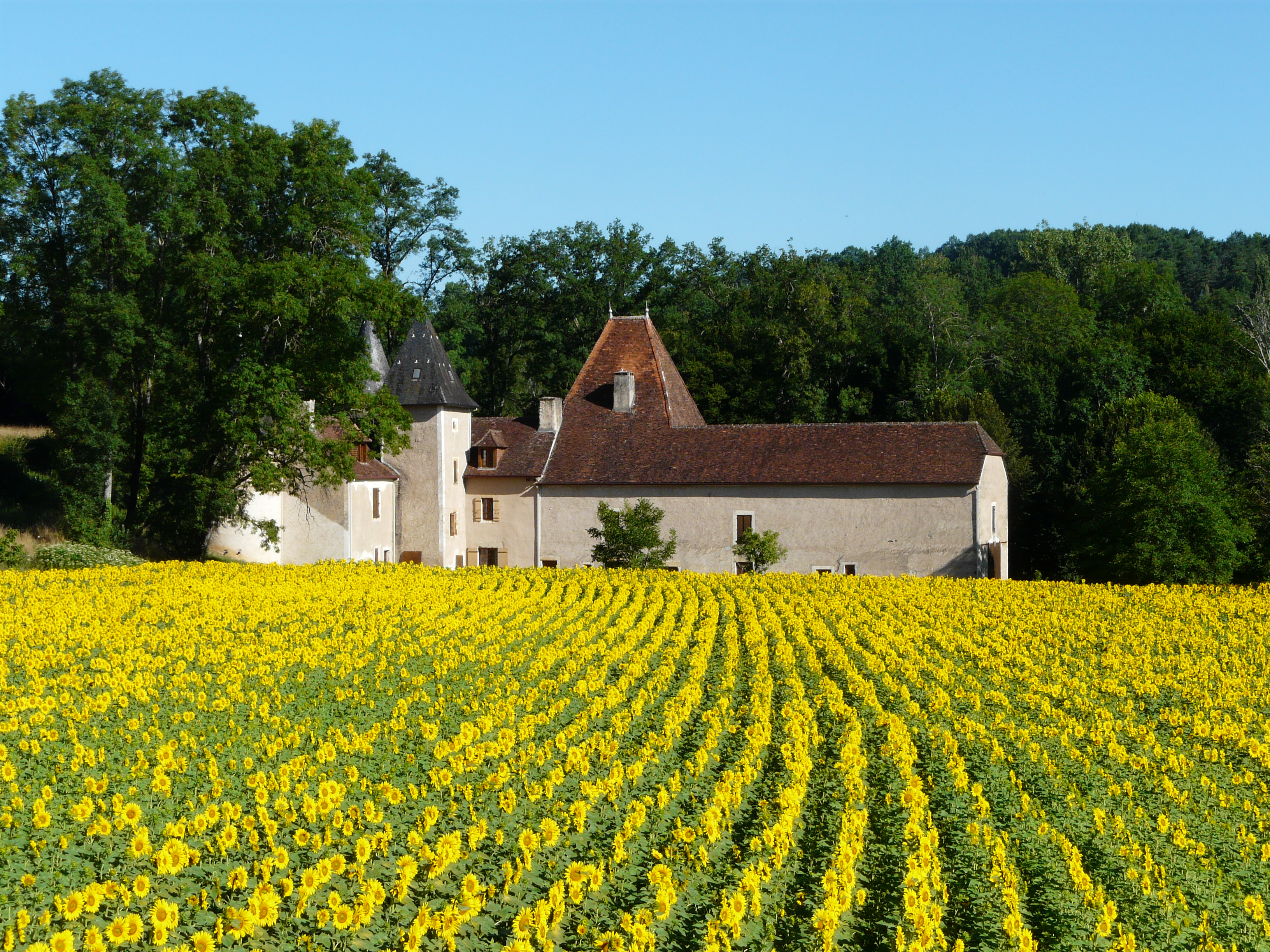 Le manoir de la Farge, Tourtoirac, Dordogne, France.